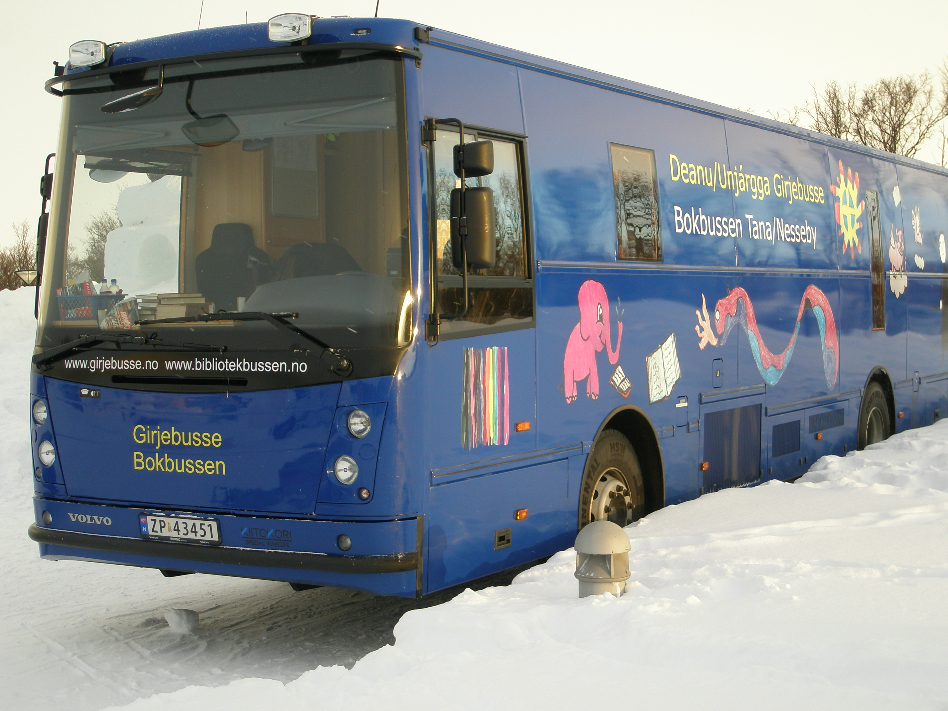 Bokbussen hadde arrangement med boklansering og joik 17. mars 2010 under Finnmarksløpet ved Varanger samiske museum.